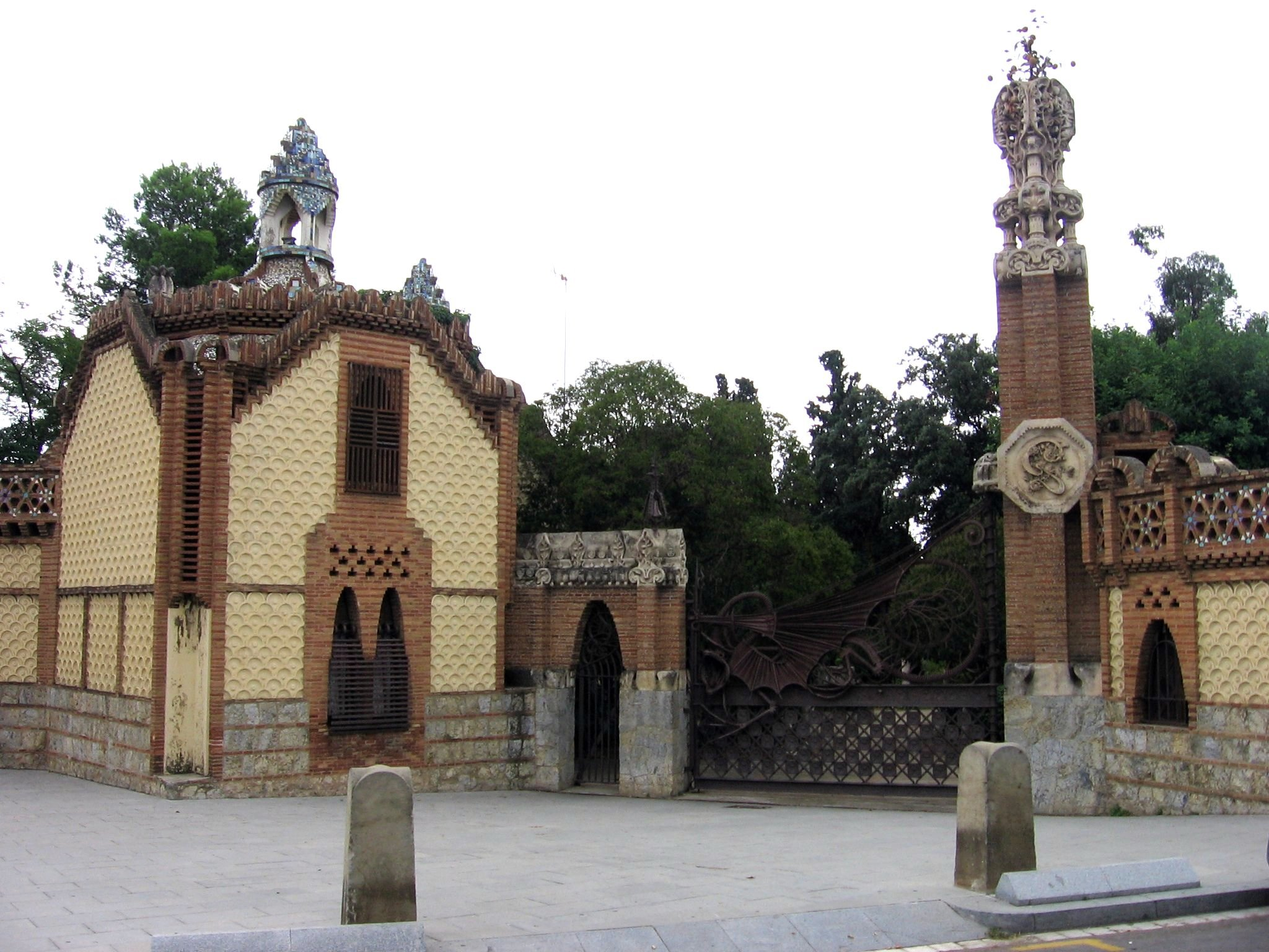 Pabellones Güell, de Antoni Gaudí (Barcelona)